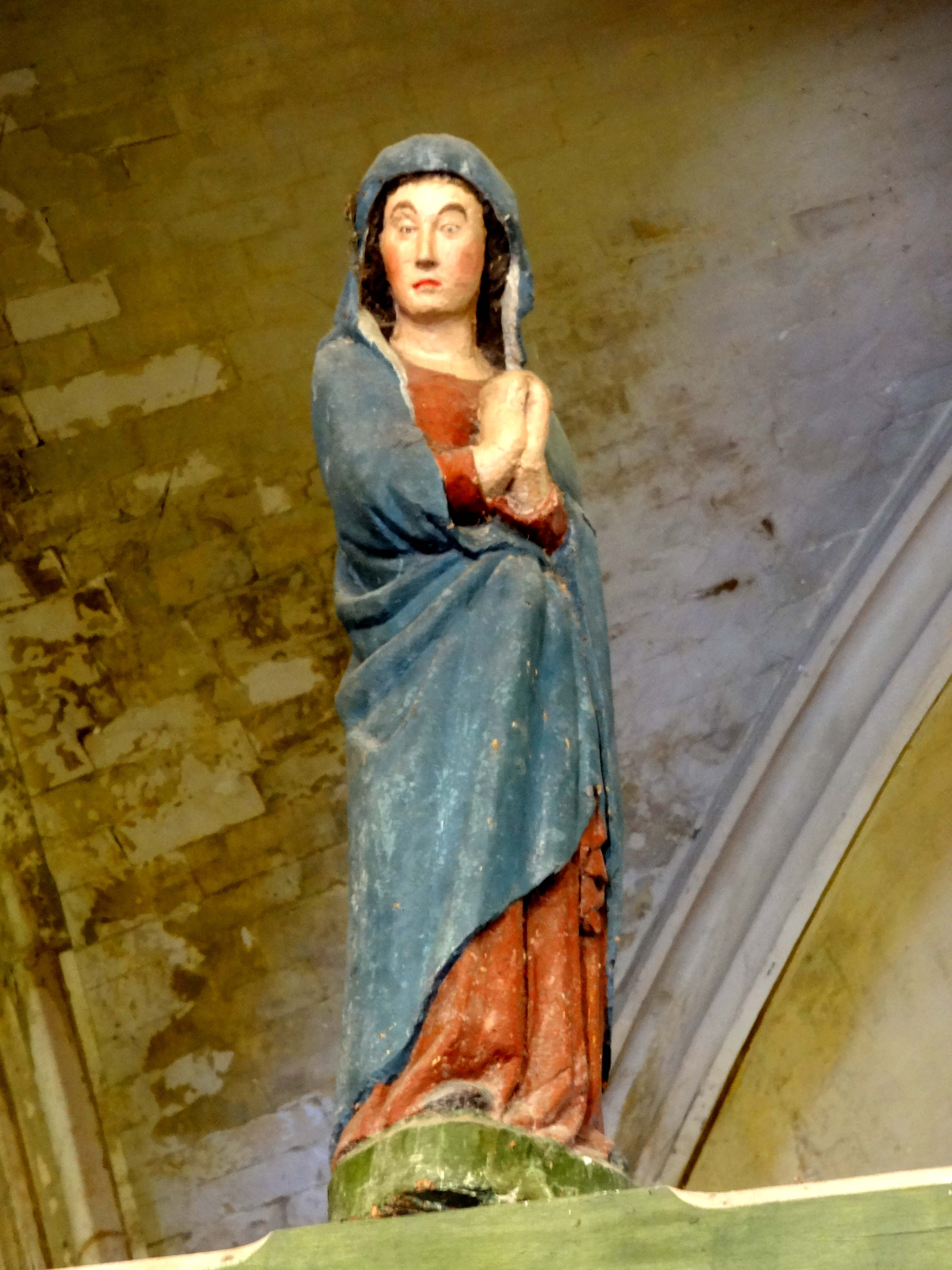 Mobilier de l'église - voir titre.